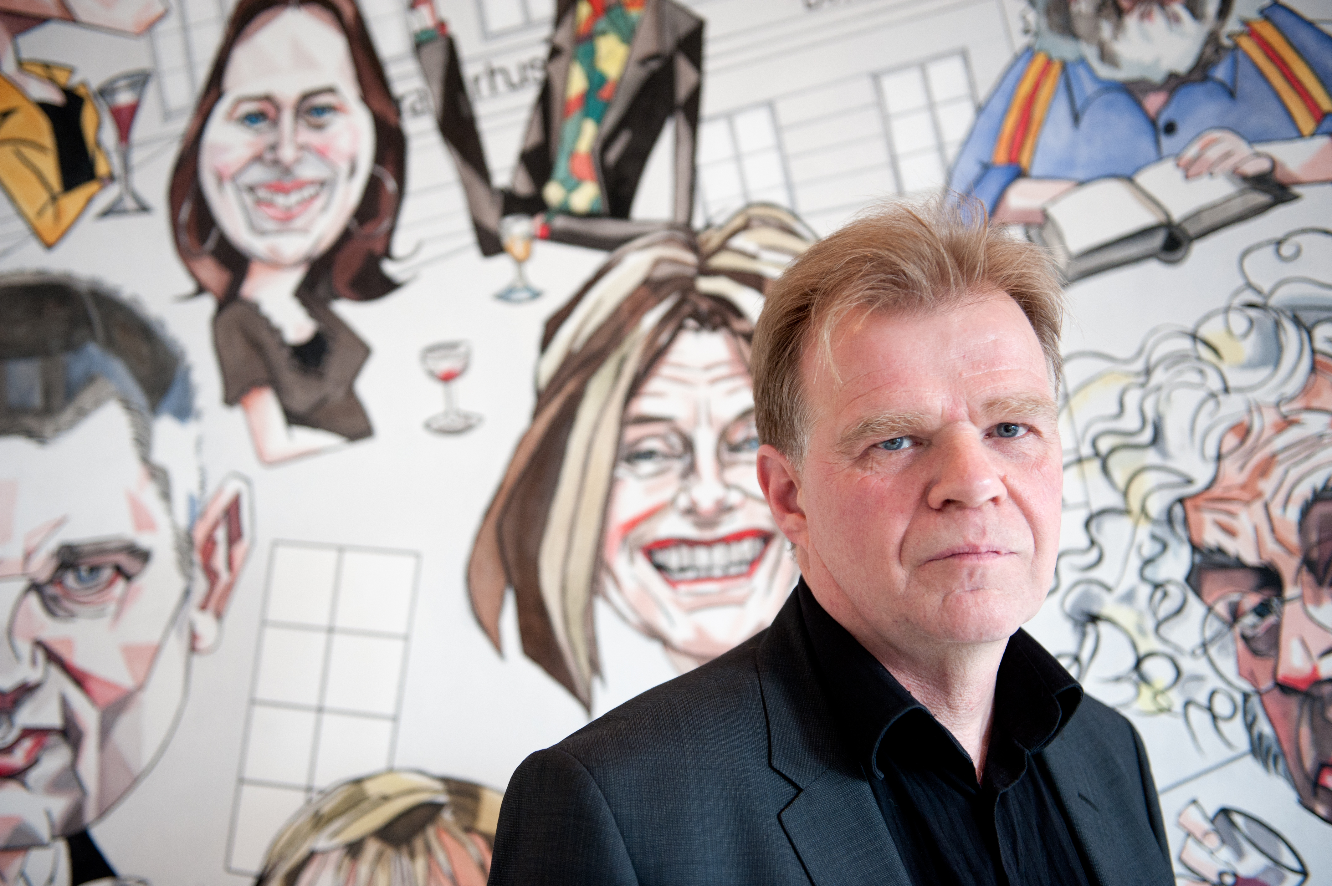 Den Isländska författaren Einar Már Guðmundsson vid ett litteraturseminarium i Oslo 2011-04-11